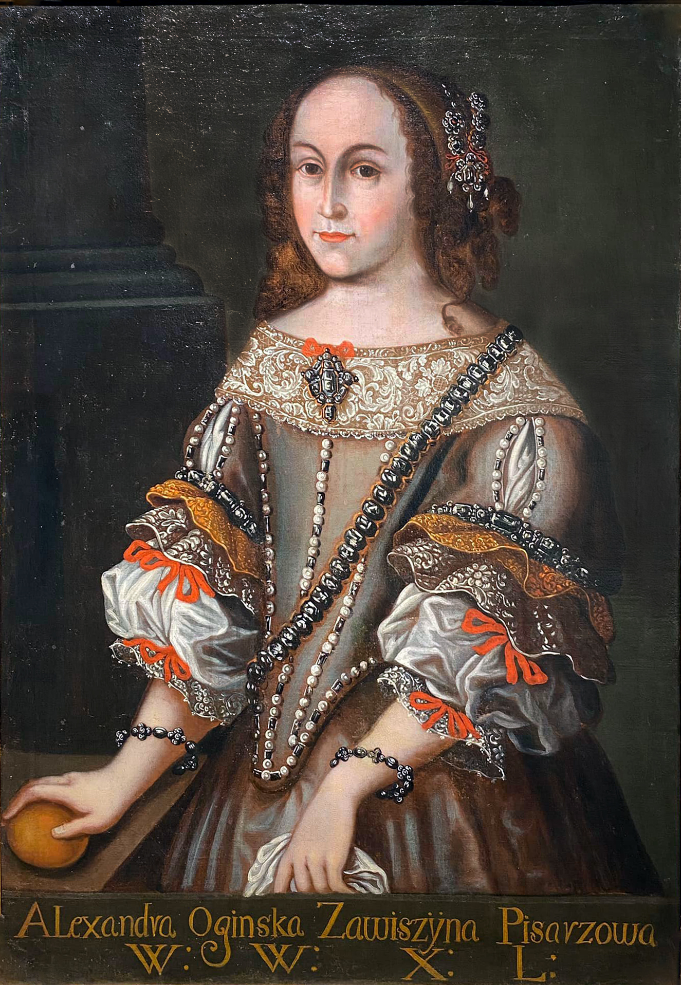 Беларуская (тарашкевіца): Партрэт Аляксандры Завішы (Alaksandra Zaviša) з князёў Агінскіх (Aginski).